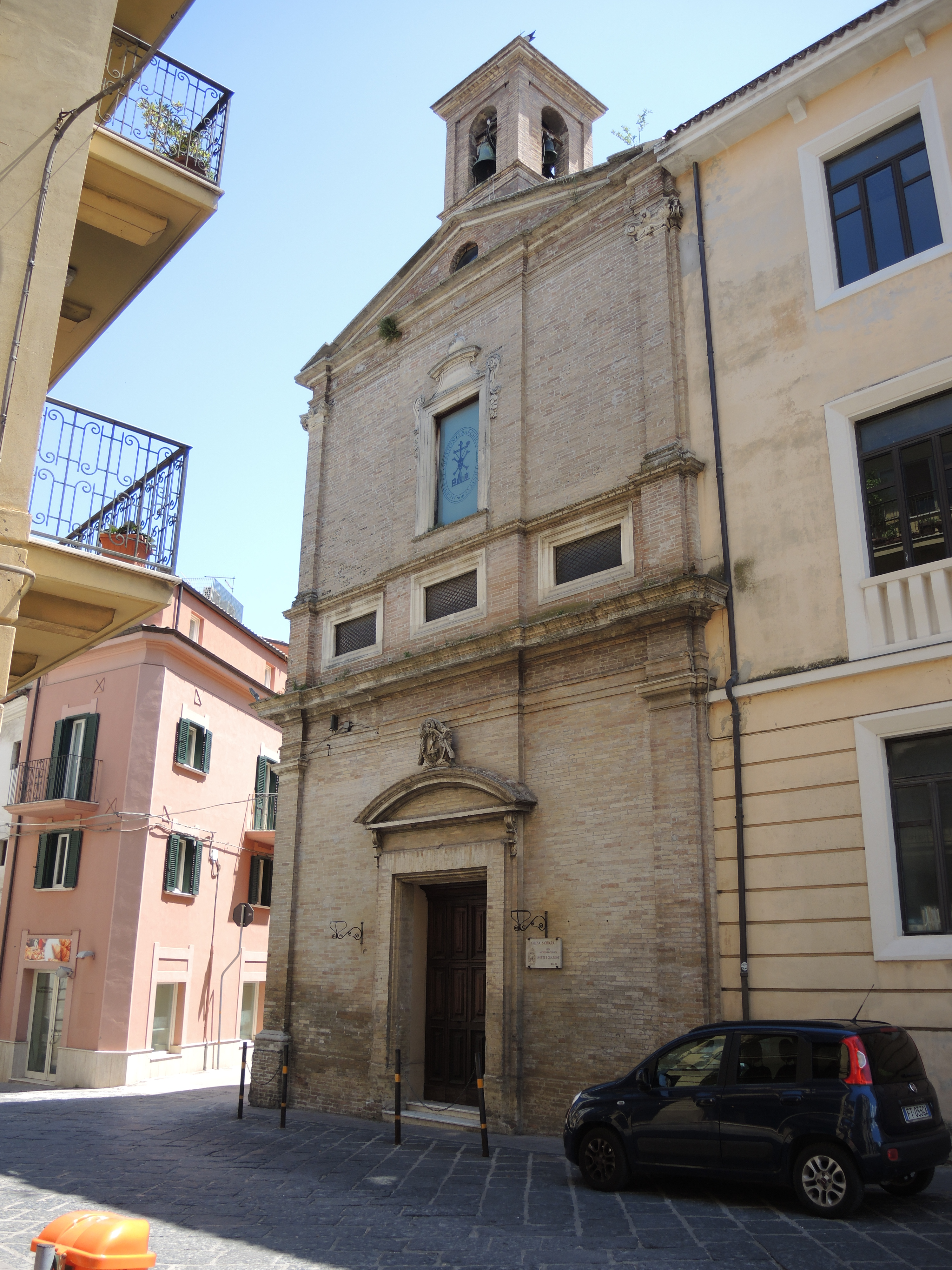 Lanciano - Chiesa di Santa Chiara